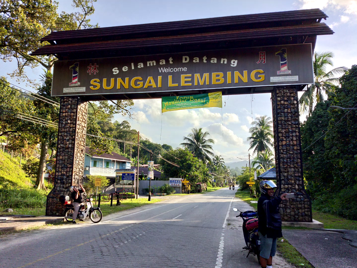 Sungai Lembing arch